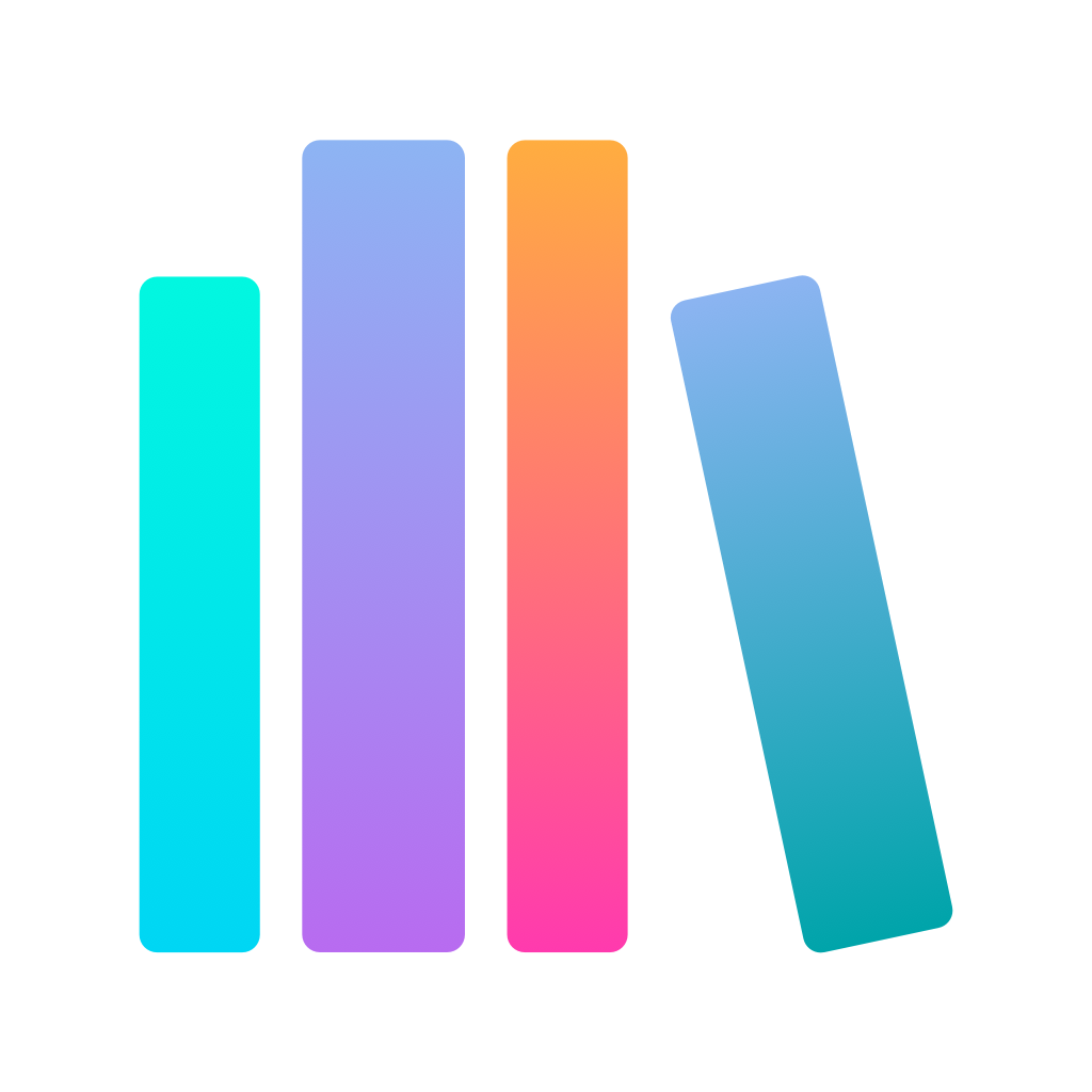 Journi Print Logo